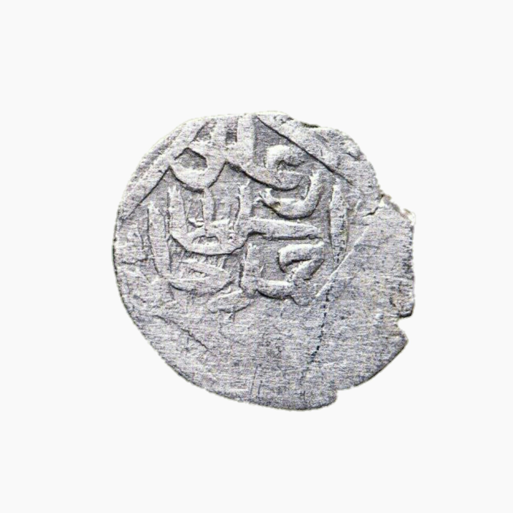 Ağqoyunlu Əhməd, Təbriz, təngə, gümüş